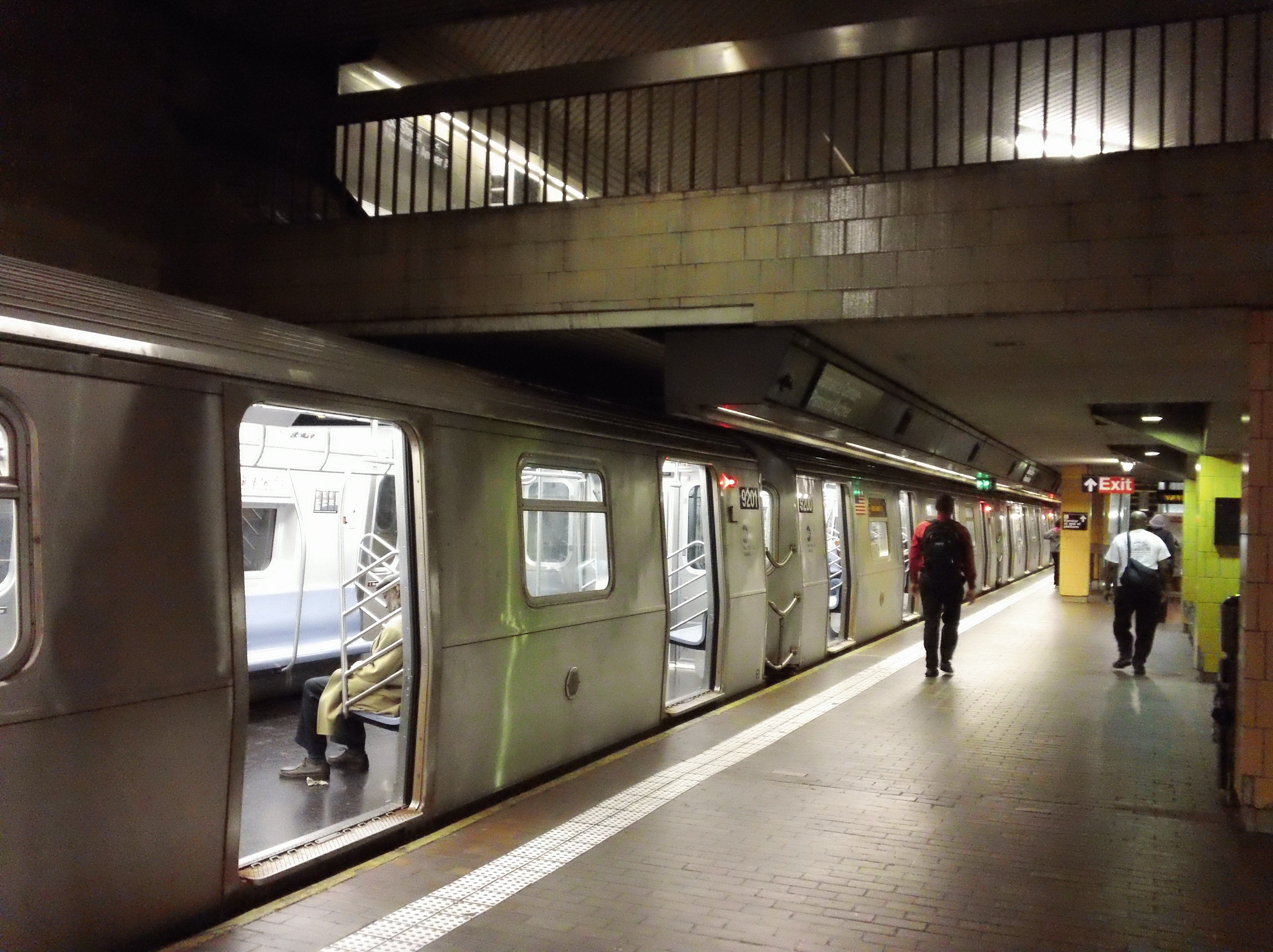 Brooklyn and Queens